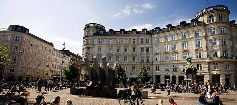 Sankt Hans Torv in the Nørrebro district of Copenhagen, Denmark